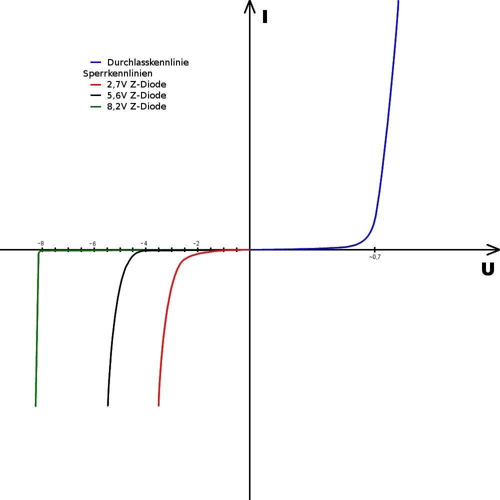 Kennlinie verschiedener Zener-Dioden